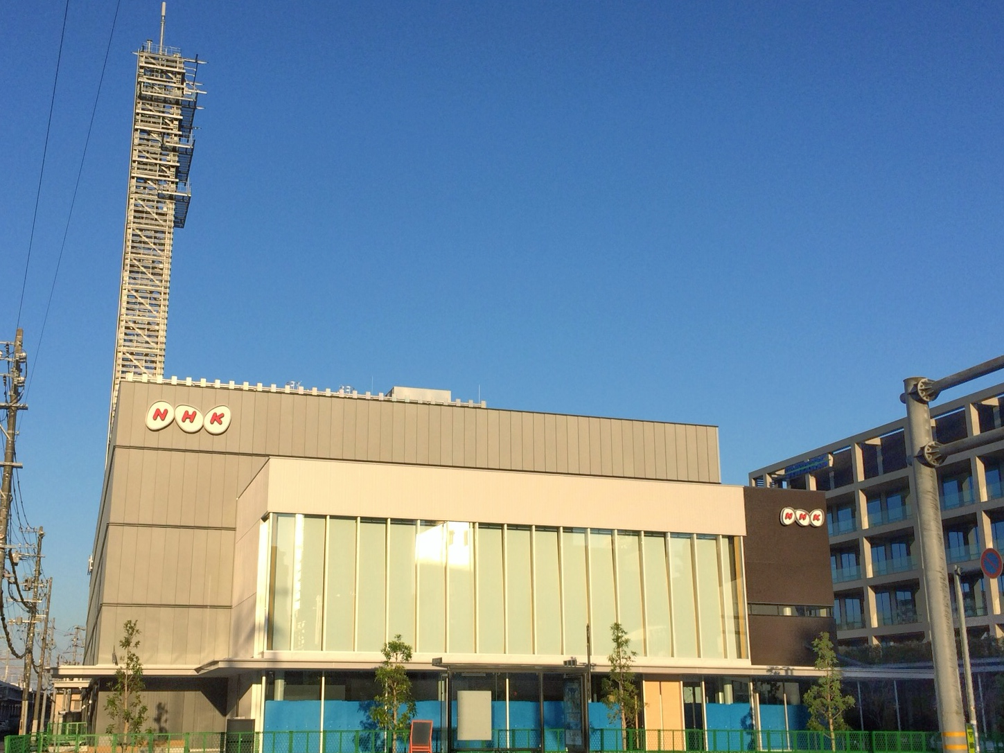 2018年オープン予定のNHK静岡放送局の画像。 局舎西側より、2017年11月6日撮影。